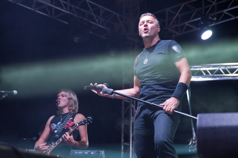 Marko Perković u Crikvenici